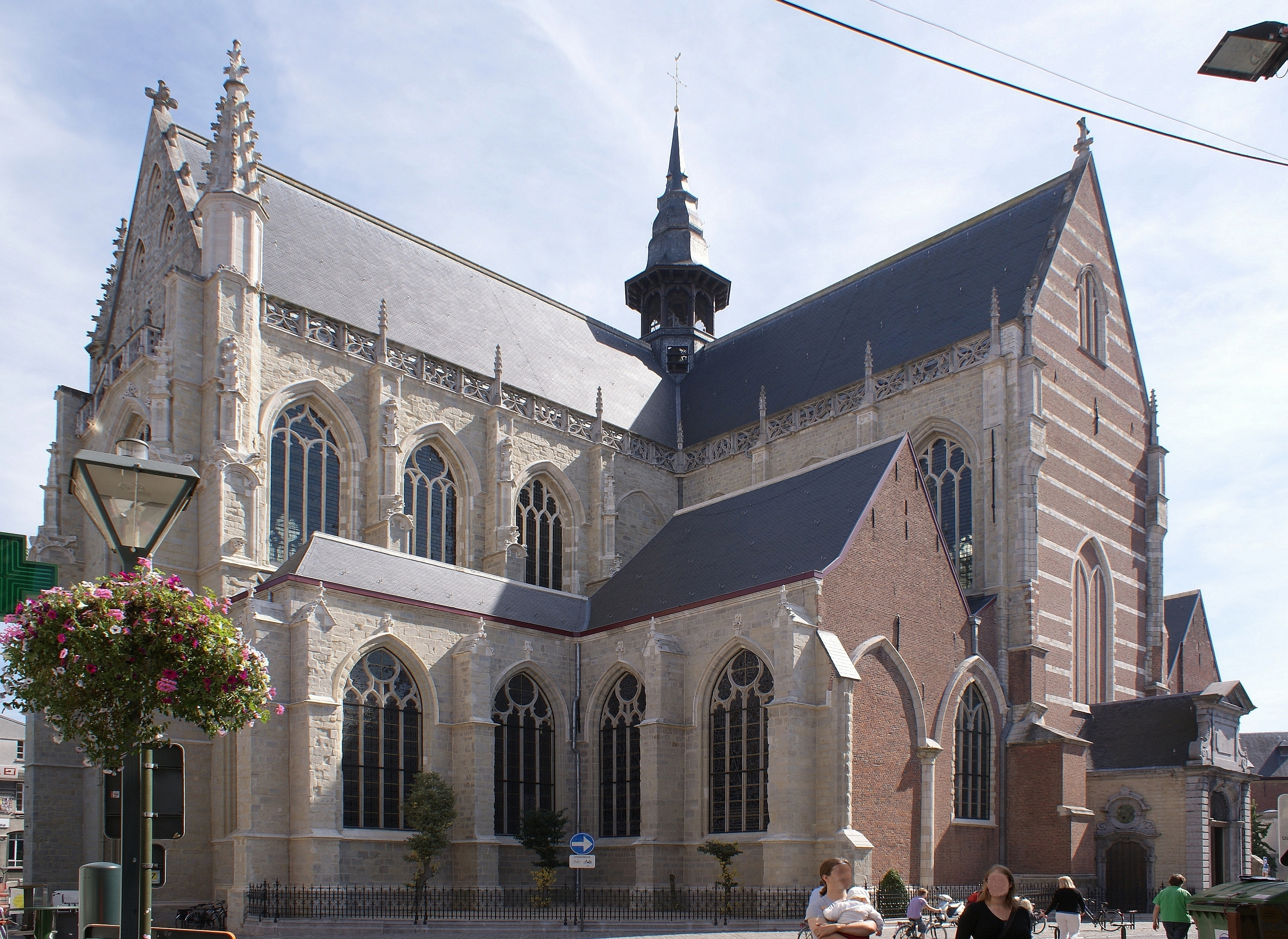 Sint-Martinuskerk (Aalst) - Buitenaanzicht